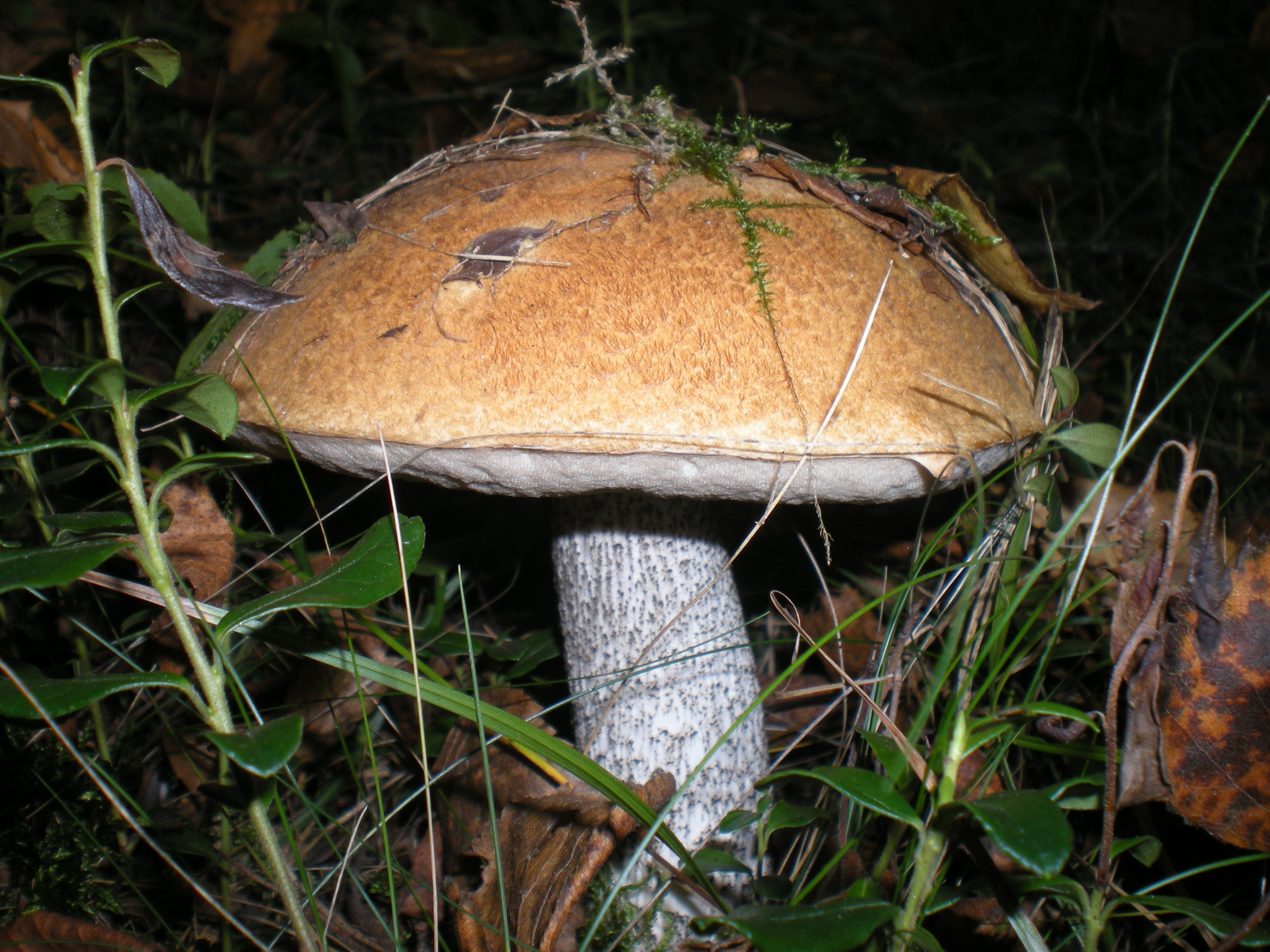 Koźlarz pomarańczowy, koźlarz pomarańczowożółty (Leccinum versipelle), Wólka Łękawska, Polska, 51°18'24"N, 19°23'34"E (51.3065, 19.3928)